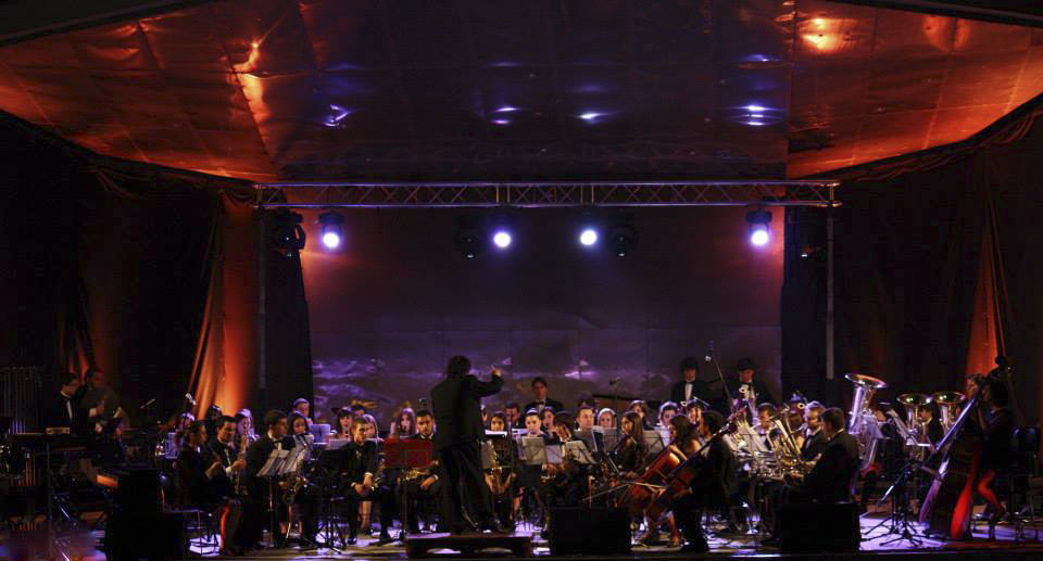 Banda de Música Municipal de Valga en concerto en Vilanova da Cerveira (Portugal)